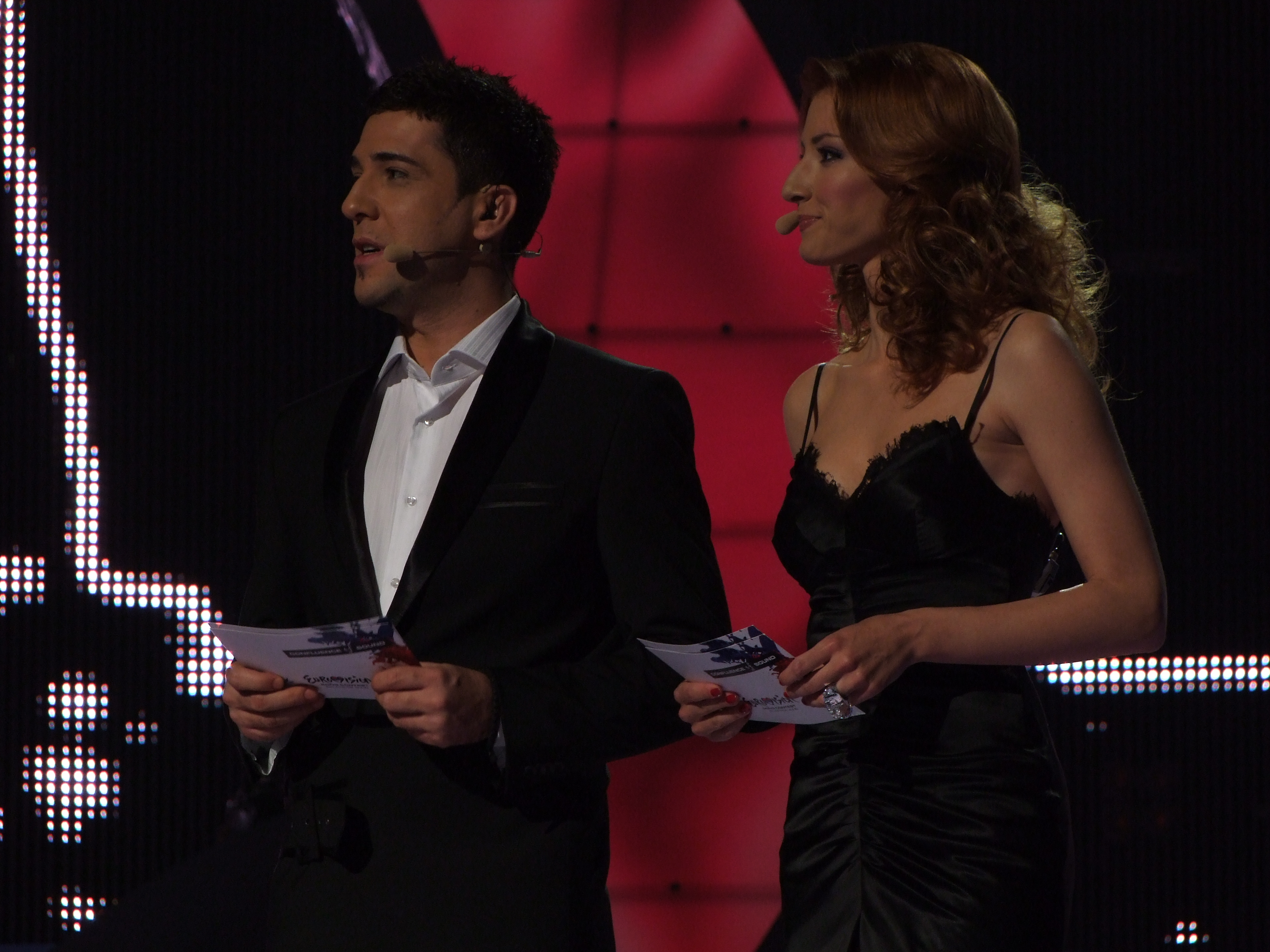 Semifinal 1 EUROVISION 2008